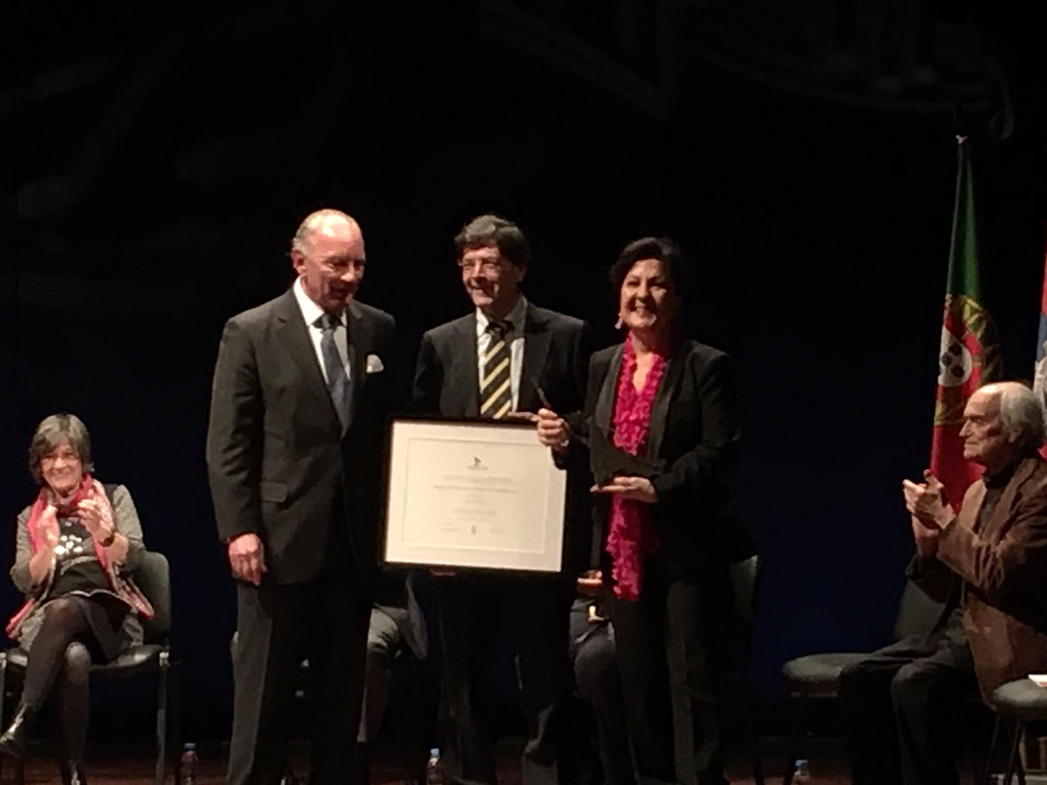 Prémios Internacionais Terras Sem Sombra